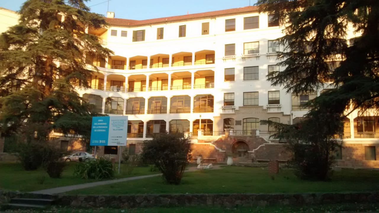 Fachada del Hospital Domingo Funes